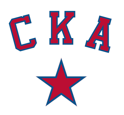 Логотип ХК СКА (Санкт-Петербург)